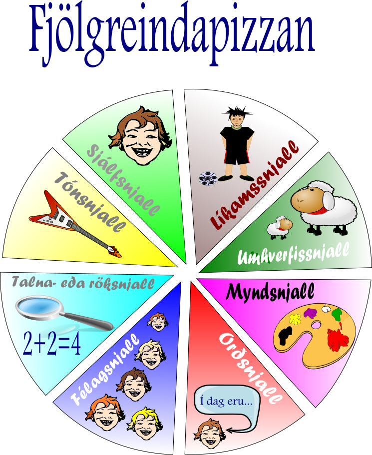 Fjölgreindakenningarpizza